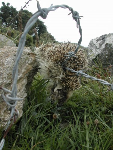 Draenog wedi ei fachu ar weiren bigog